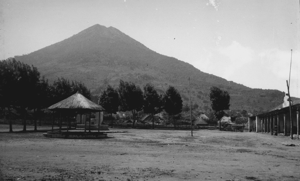 Fotografías de Juan José de Jesús Yas en Antigua Guatemala y sus alrededores en la década de 1910.